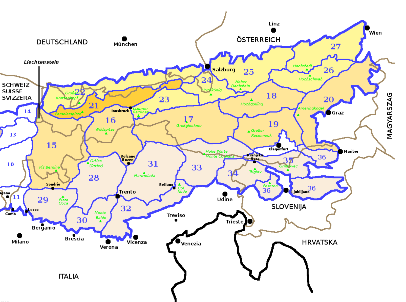 Alpi Orientali secondo la SOIUSA con evidenziate le Alpi Calcaree Nordtirolesi